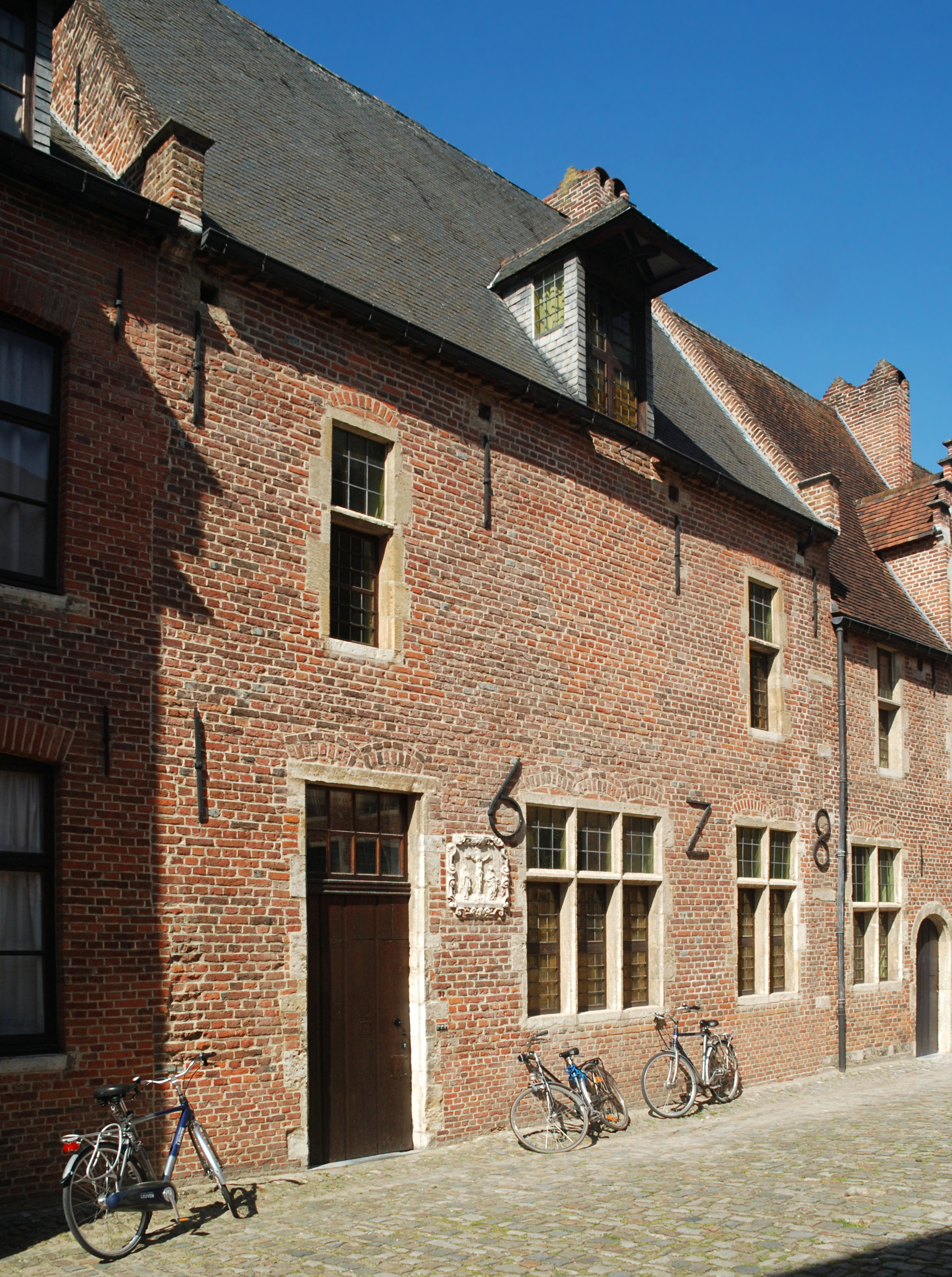 Belgium - Leuven - Groot Begijnhof - Bovenstraat n° 77 - Convent van Bethlehem (1628)